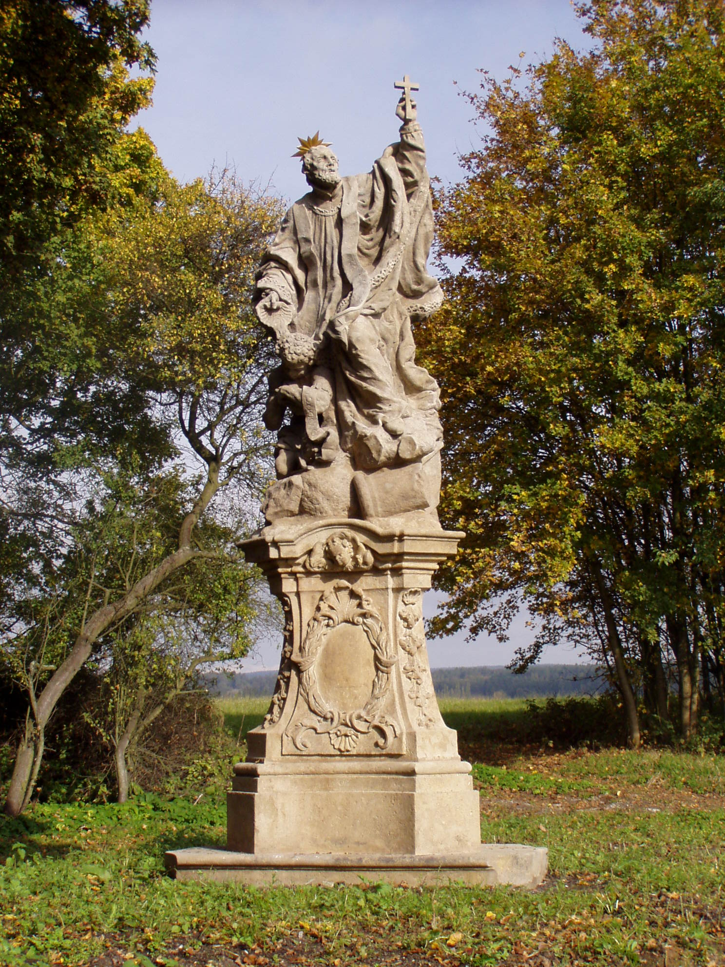 Socha sv. Františka Xaverského (Zboží), Na Mlýnském kopci, Zboží